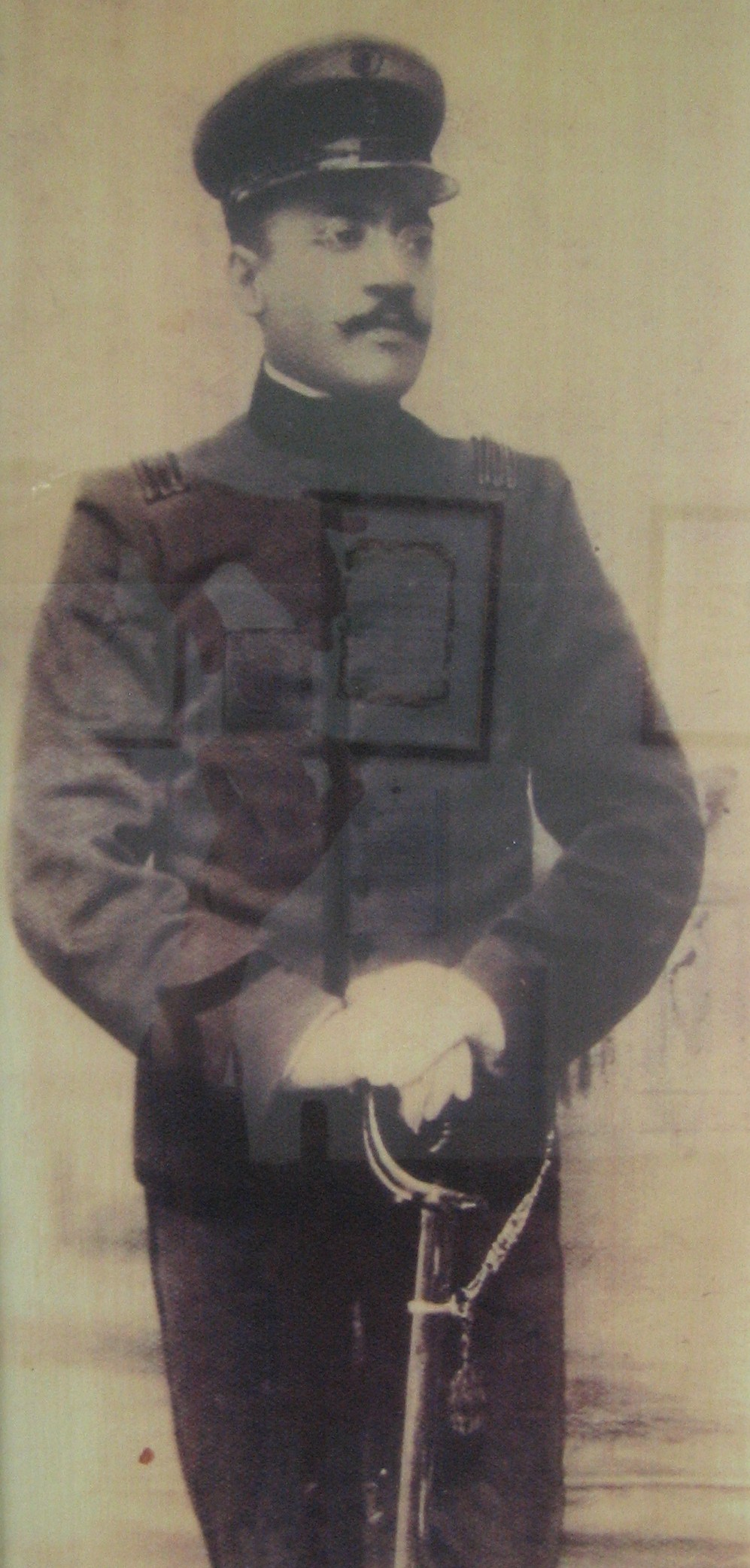 Fotografía de Cayetano Silva, también conocido como Cayetano Alberto Silva, músico uruguayo con ascendencia africana y nacionalizado argentino, autor de la música de la Marcha de San Lorenzo.